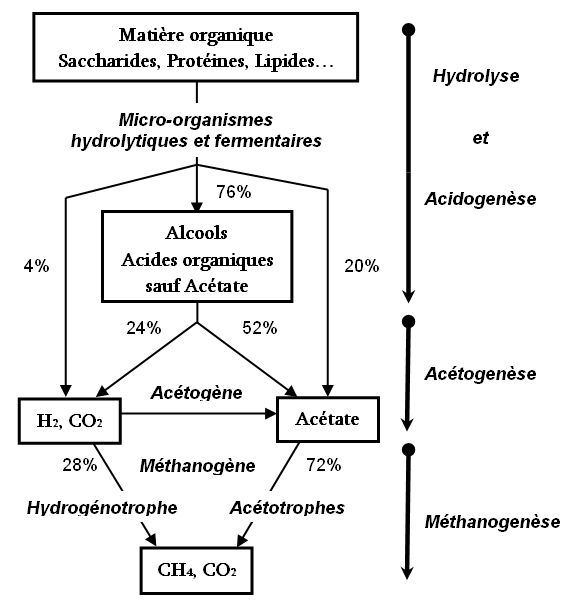 Méthanogenèse.jpg